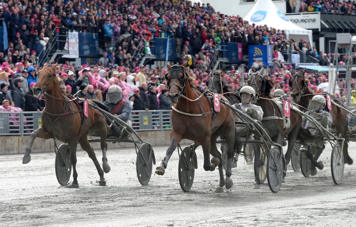 Aubrion du Gers och Dijon i finalen av Elitloppet 2019. Trea Makethemark.